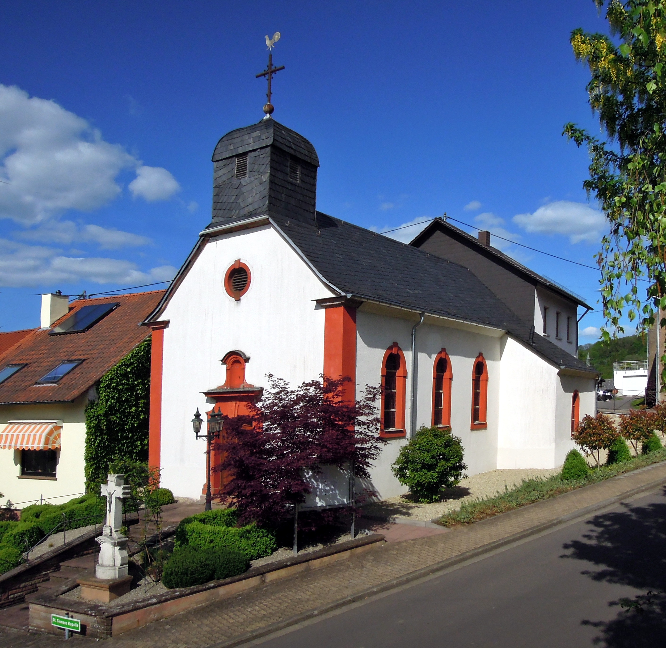 St. Clemenskapelle in Menningen